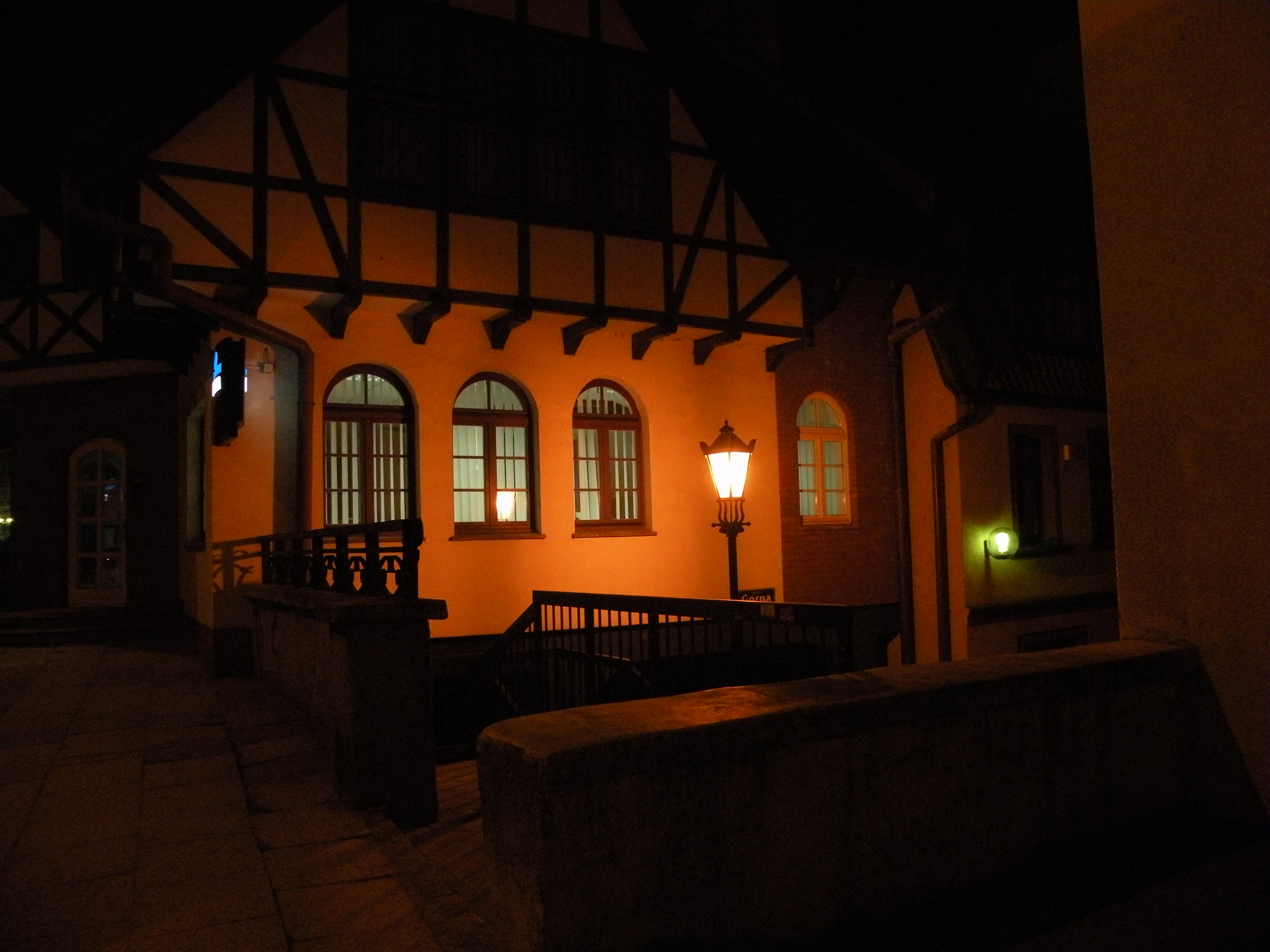 Ulica Górna w Olsztynie, budynek Warty, nocą